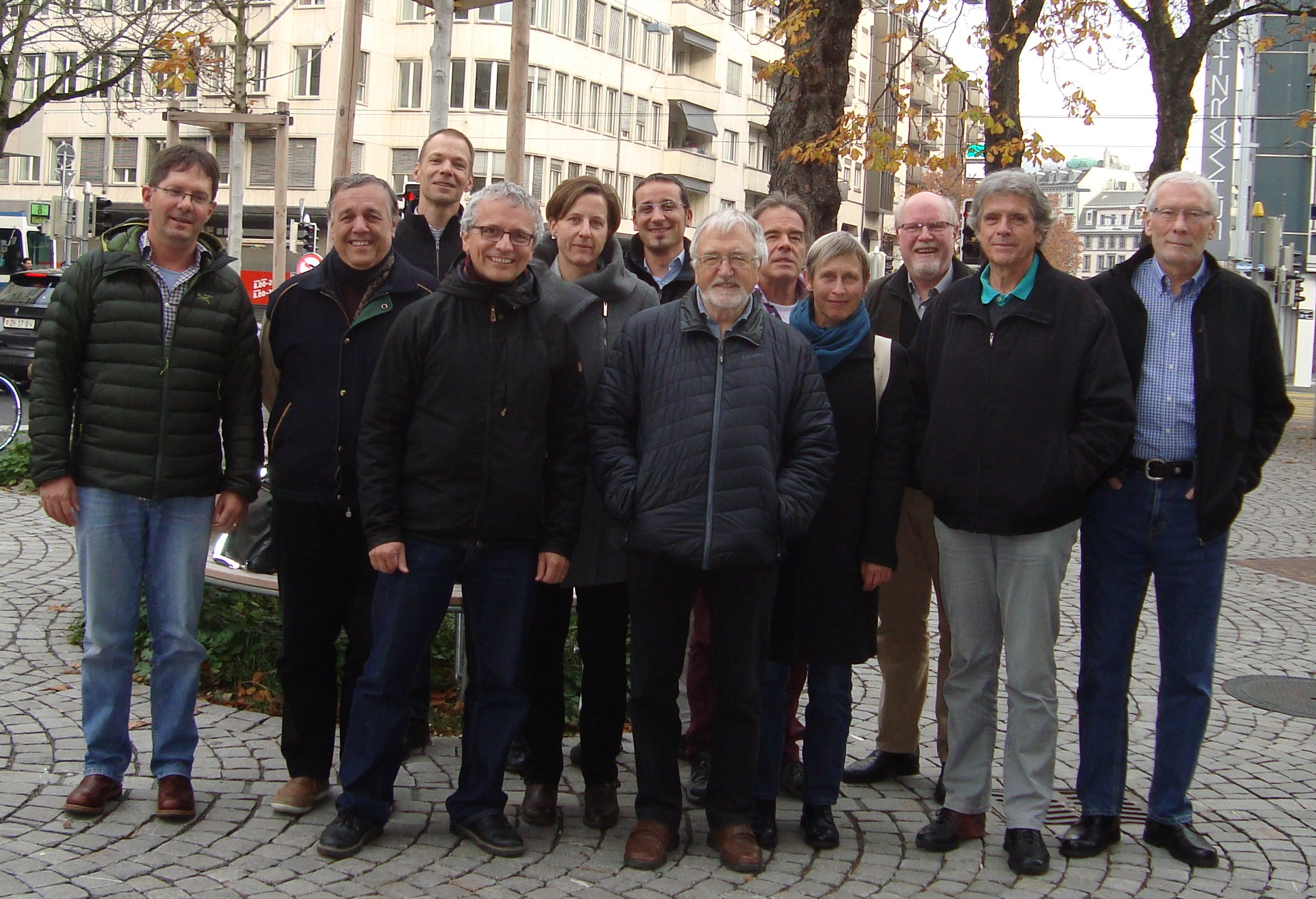 Gruppenbild Schweizerische Informatikkonferenz, Arbeitsgruppe GIS (SIK-GIS)